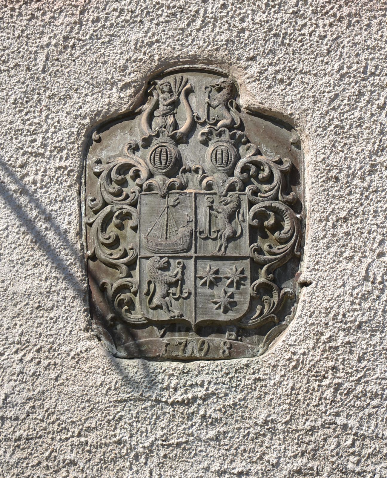 Čejkové z Badenfeldu - erb ve Slezských Rudolticich